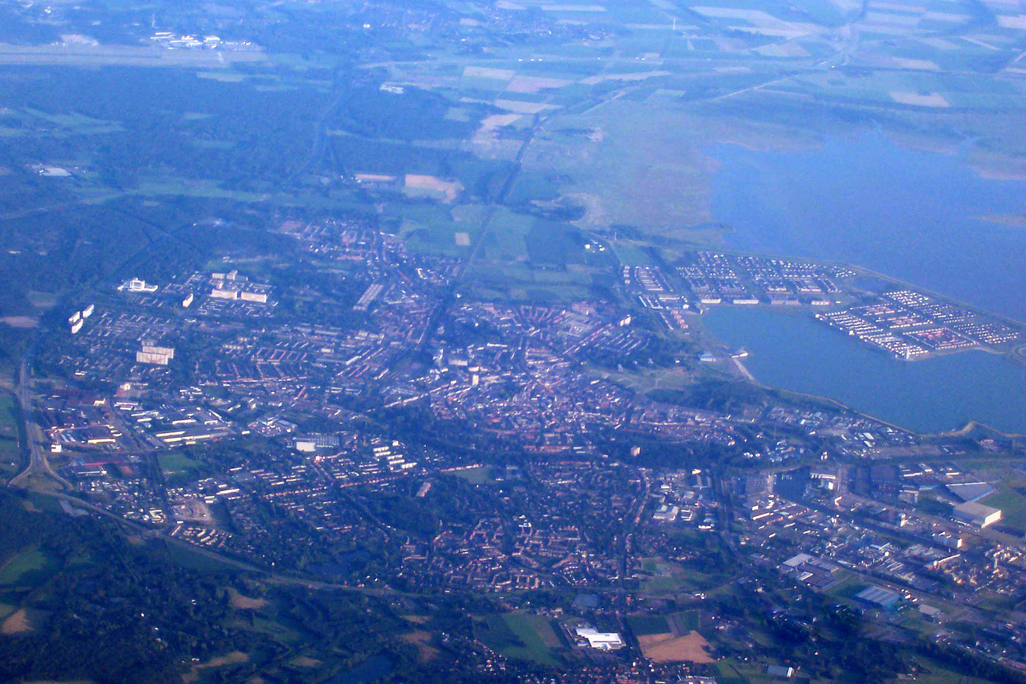 Luchtfoto van Bergen op Zoom (Brabants: Bèrge), een stad in de provincie Noord-Brabant.